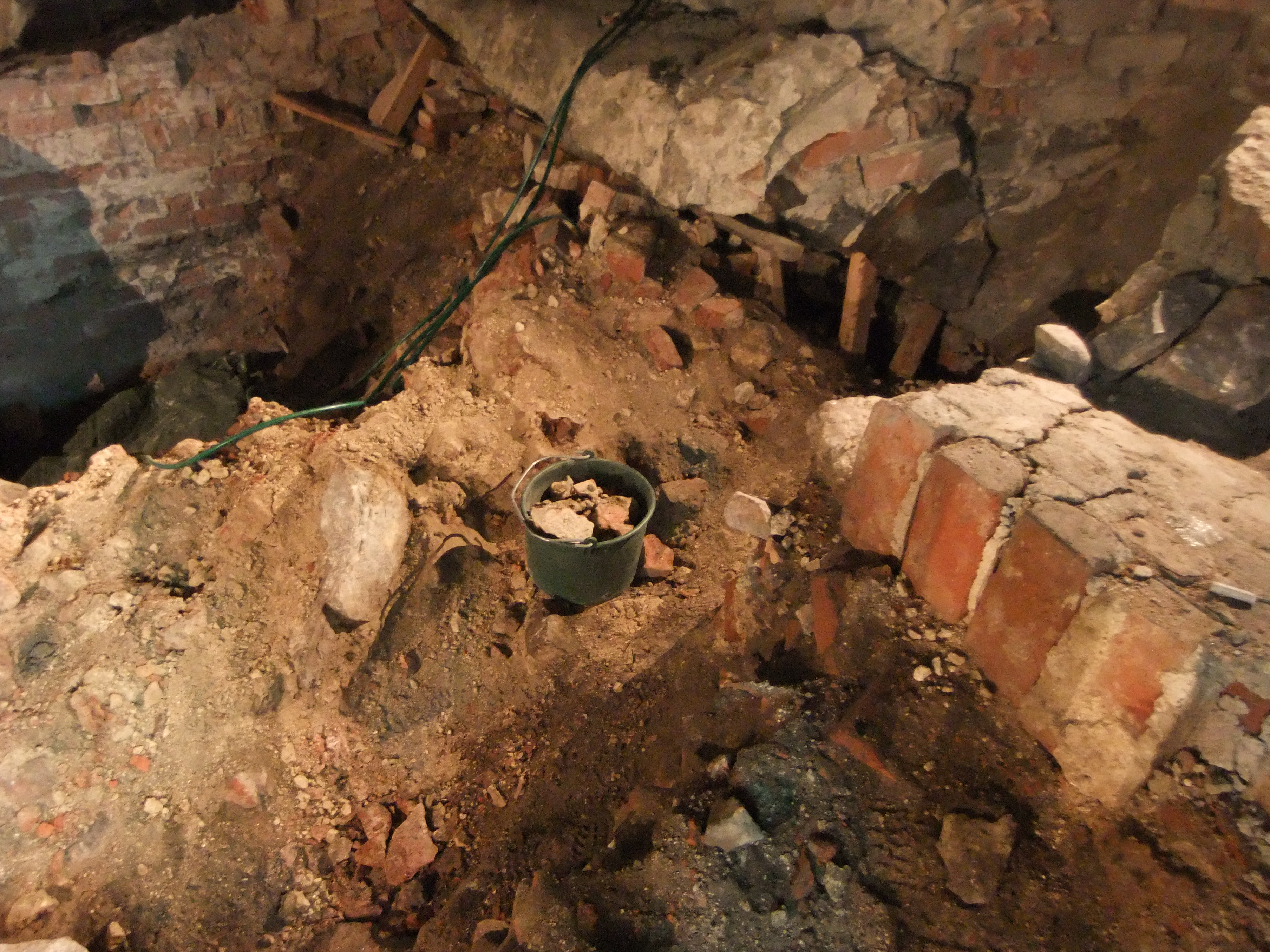 Yleiskuva Aboa Vetus & Ars Nova -museon arkeologiselta kaivaukselta 2012. Kuvassa on keskiaikaisen nk. suuren kivitalon kellari.